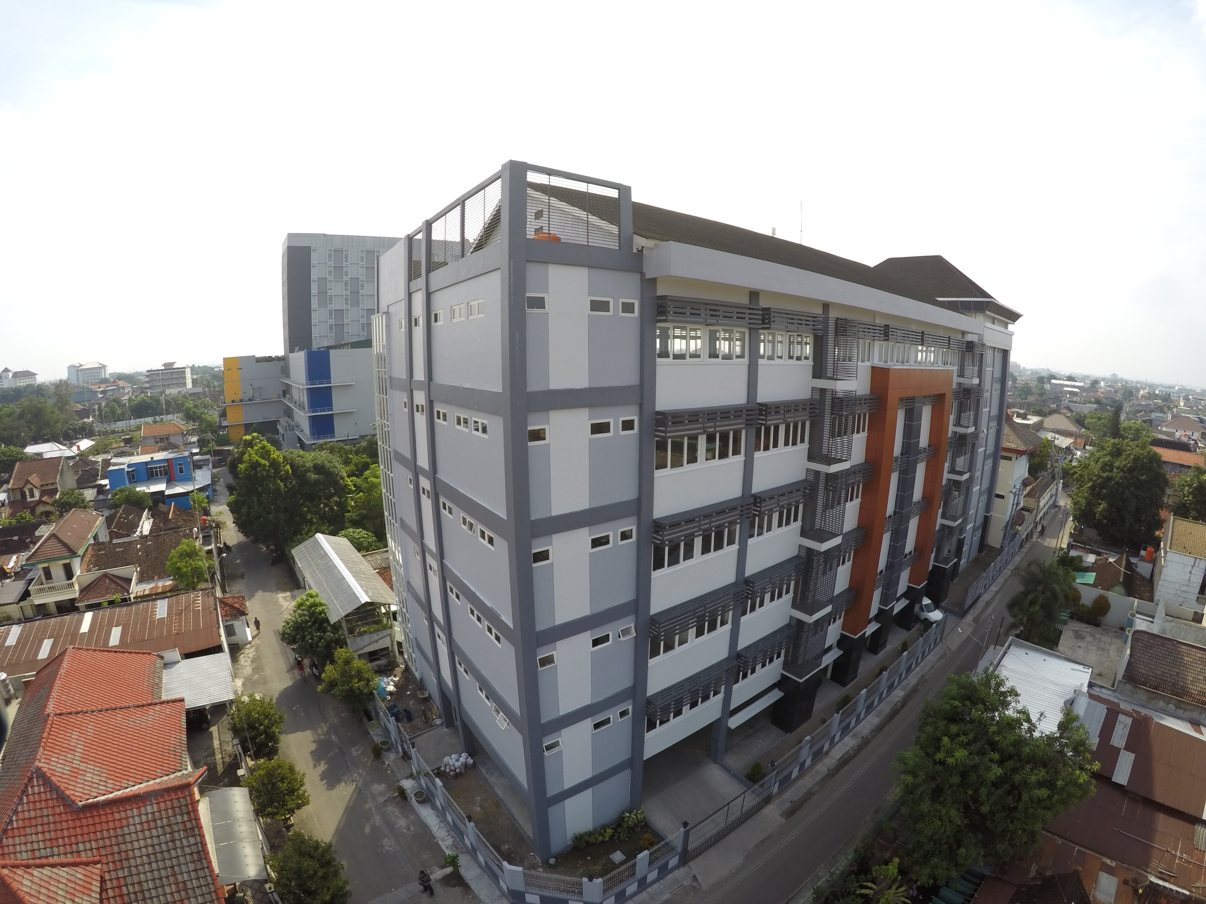 Universitas Islam Batik Surakarta (UNIBA) Alamat : Jl. KH Agus Salim No. 10 Surakarta Telepon (0271) 714751 Fax. (0271) 740160 uniba.ac.id